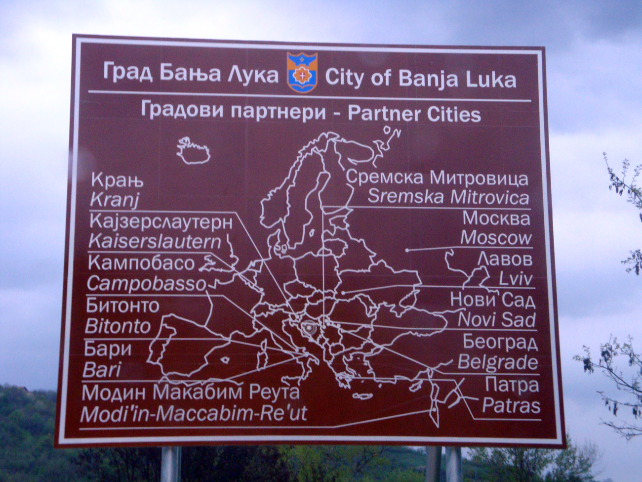 Бања Лука-градови партнери